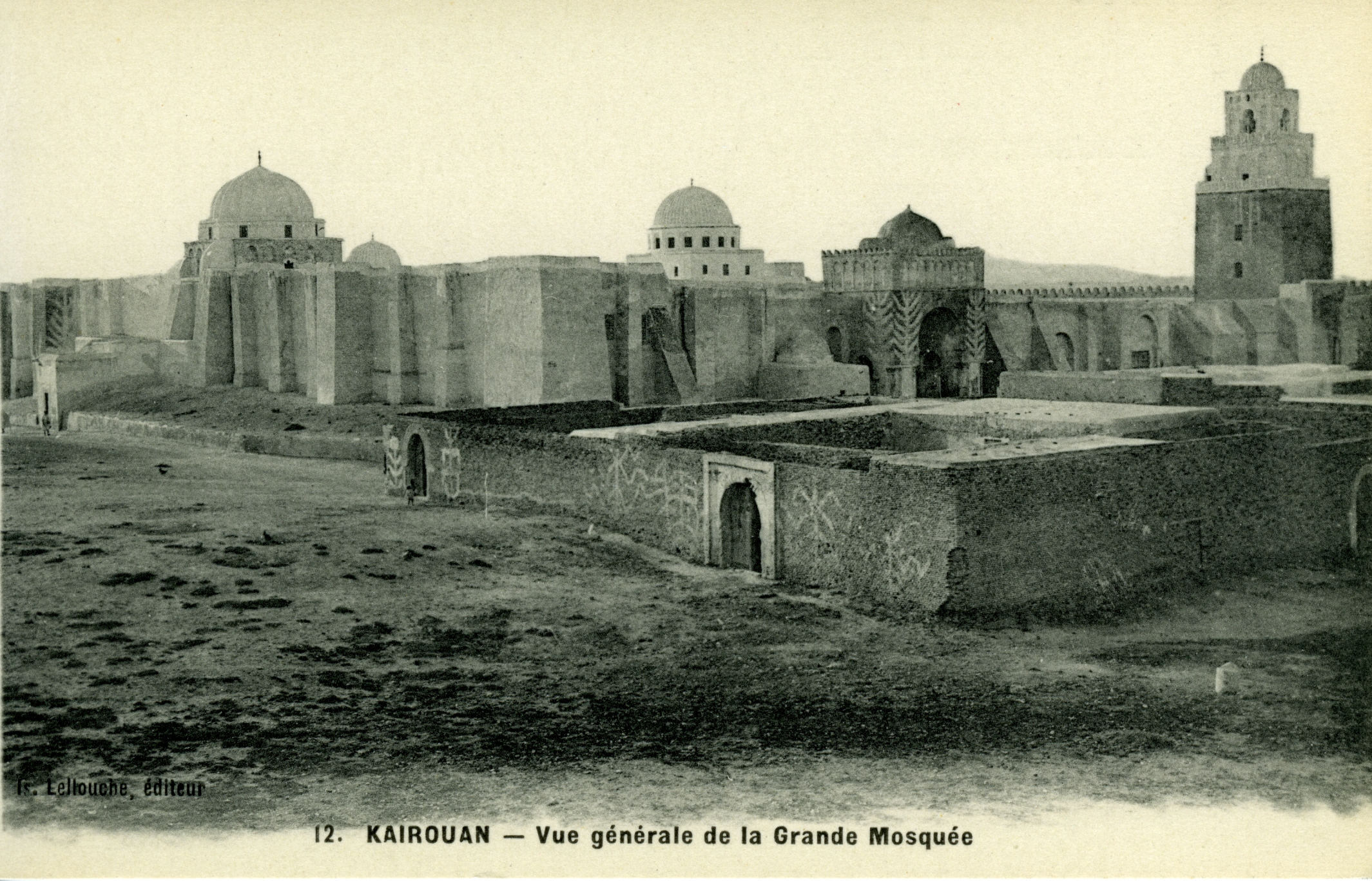 Kairouan 1900